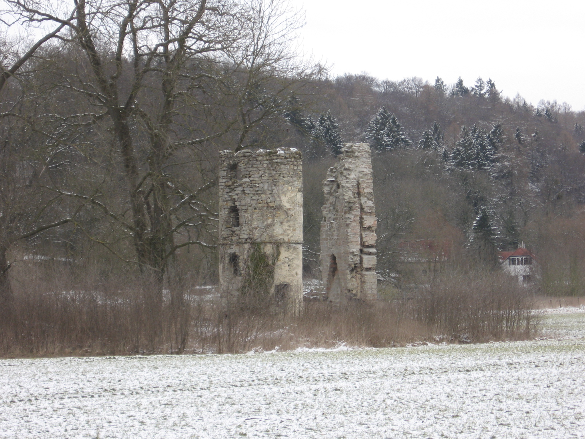 Ruine der Niederburg von Südosten am Ortsrand von Brenken